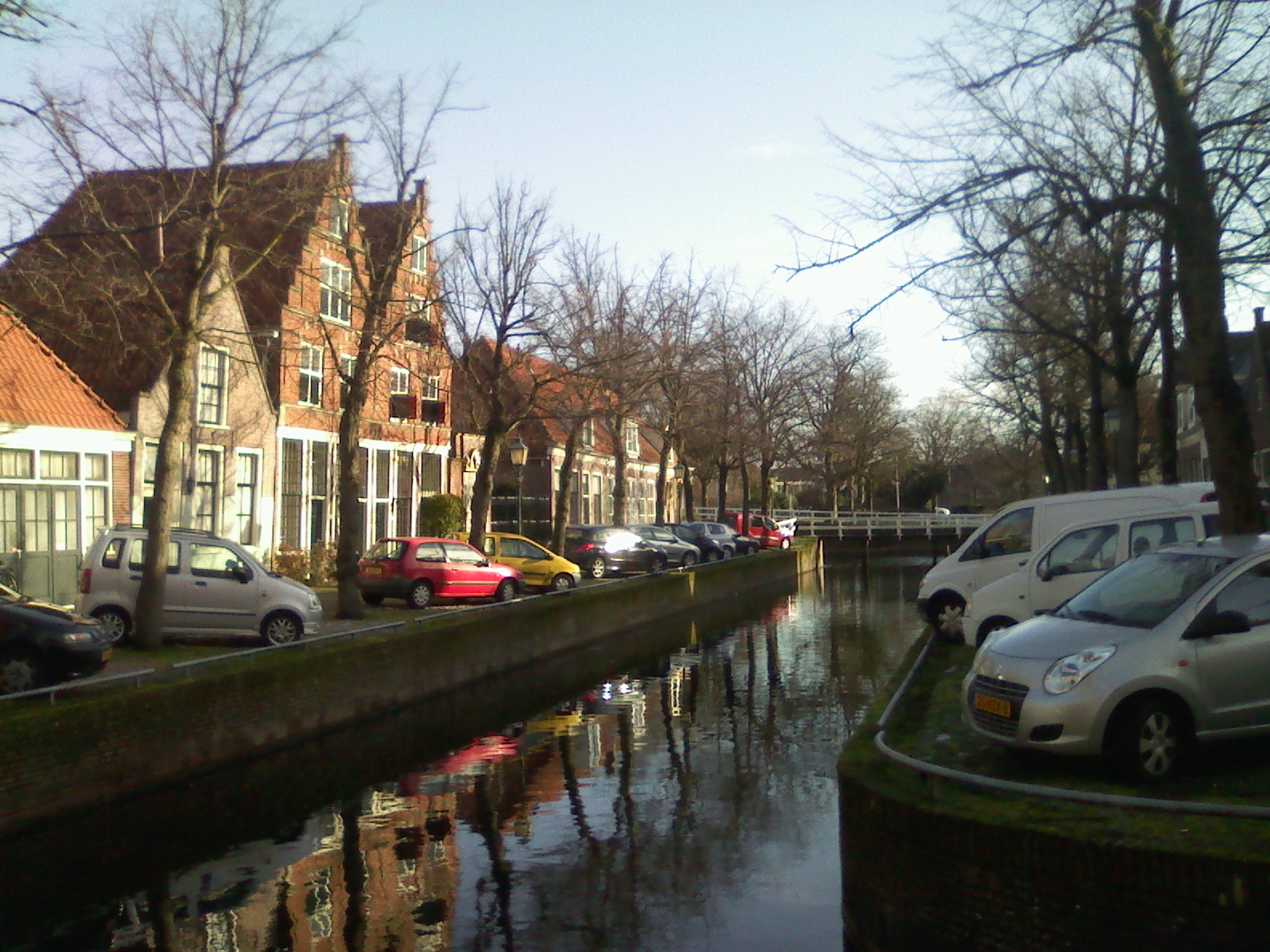 12 februari 2014, de Munnickengracht in Hoorn. Links nrs. 15 en 17 behorende bij het Claas Stapelhof.